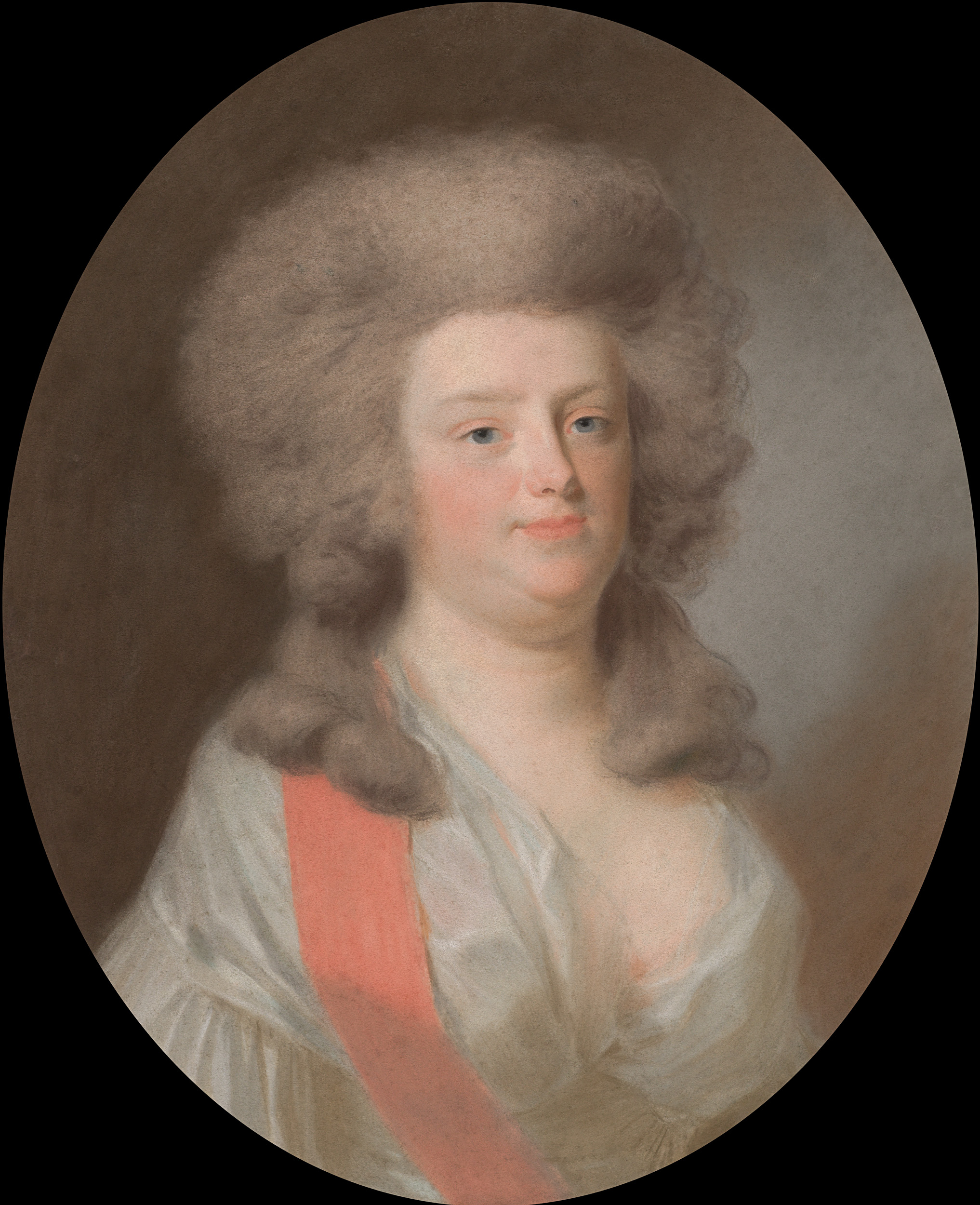 Portret van Augusta Maria Carolina van Nassau-Weilburg (1764-1802). Nicht van Willem V, prins van Oranje-Nassau, dochter van zijn zuster Carolina. Ten halven lijve naar rechts. Maakt deel uit van een reeks van negen portretten van prinsen en prinsessen uit het huis van Oranje-Nassau (SK-A-408/416). Onderdeel van de collectie pastels.